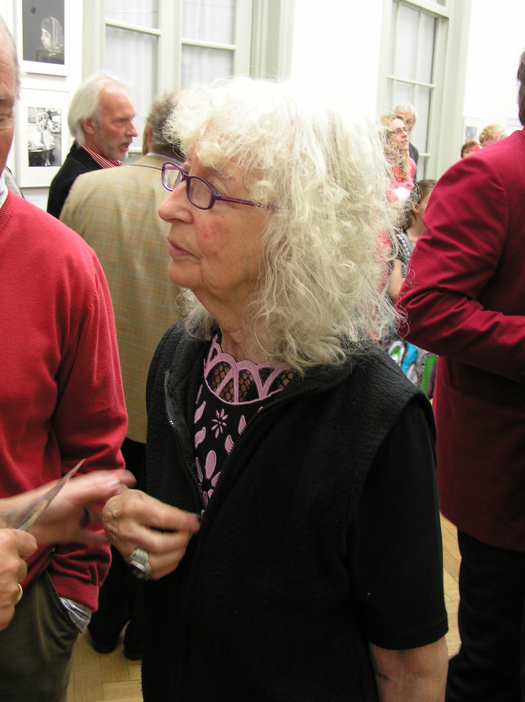 Fotografe Marianne Dommisse (1927), bij de opening van dubbeltentoonstelling van haar werk in het Haags Historisch Museum en Studio Pulchri op 20 juni 2009.